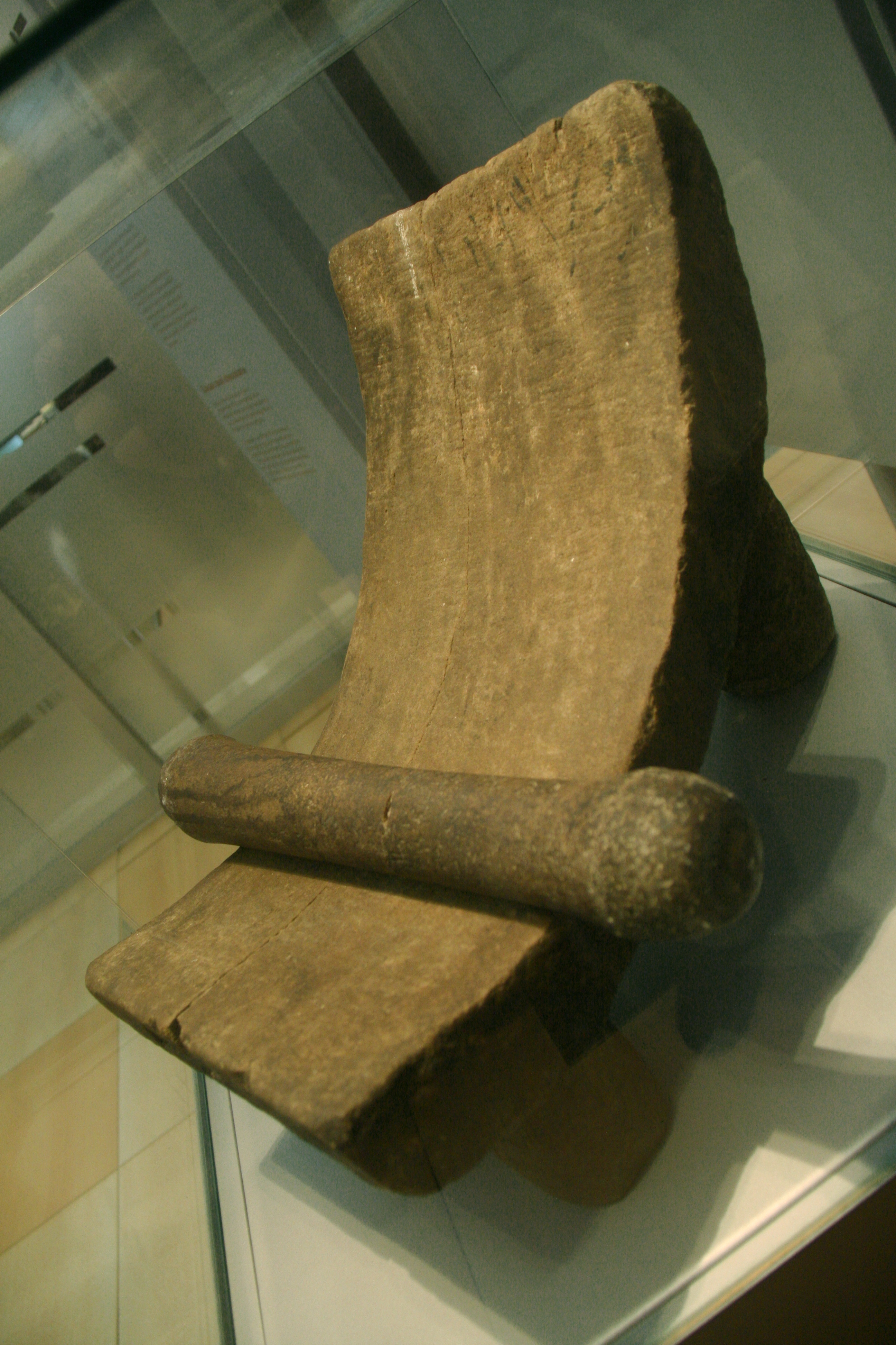 Metate del Museu de la Xocolata (Barcelona)